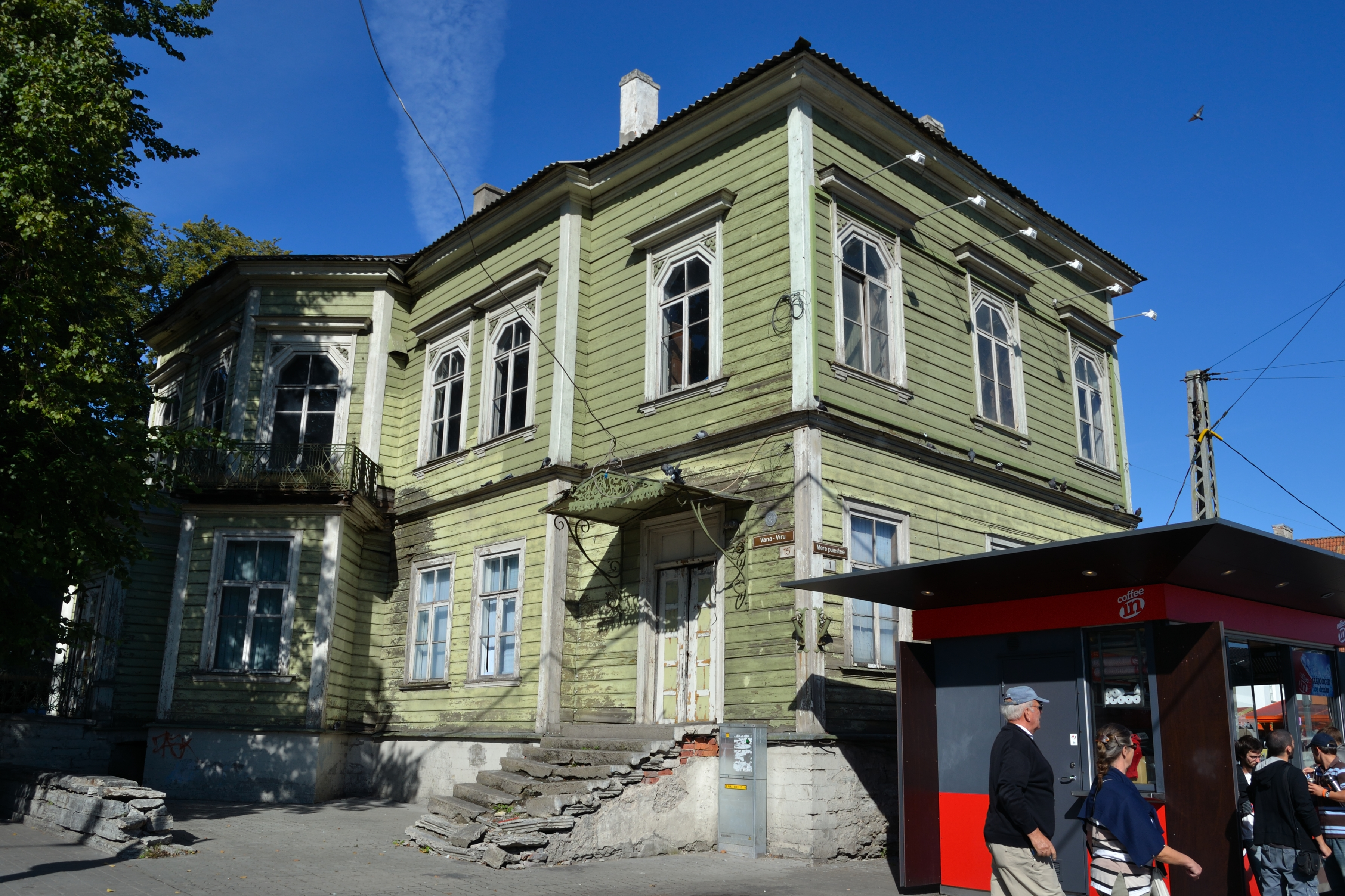 Tallinn, elamu apteegiga Vana-Viru 15 välistrepi piirdega